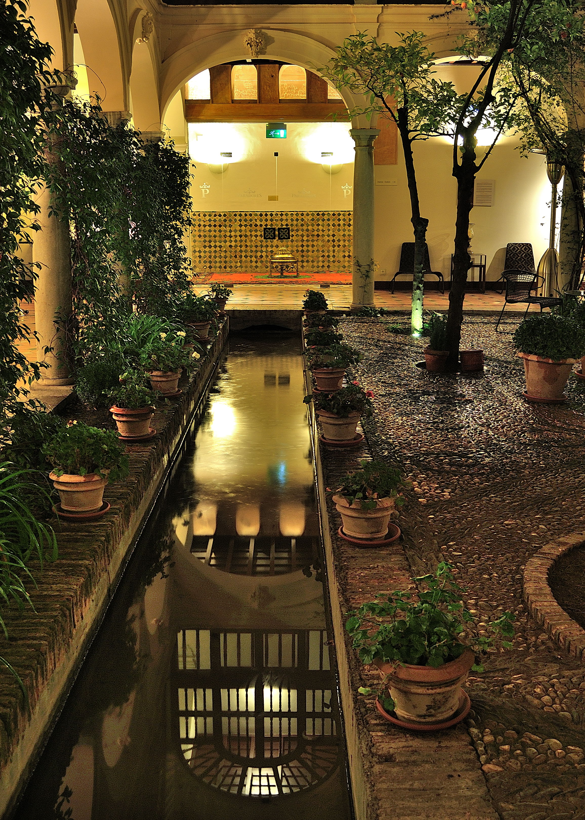 Tras la toma de Granada, Isabel la Católica entregó a los franciscanos un palacio nazarí, construido con las trazas del Generalife. Los monjes transformaron su patio alargado en claustro e iglesia, y sus jardines en una productiva huerta. Hoy alberga el Parador. Fotografía de Azacaya situada en el claustro del Parador